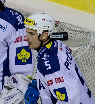 Jan Chábera, Rytíři Kladno 0:2 HC Energie Karlovy Vary; Tipsport Extraliga, 2014-02-28